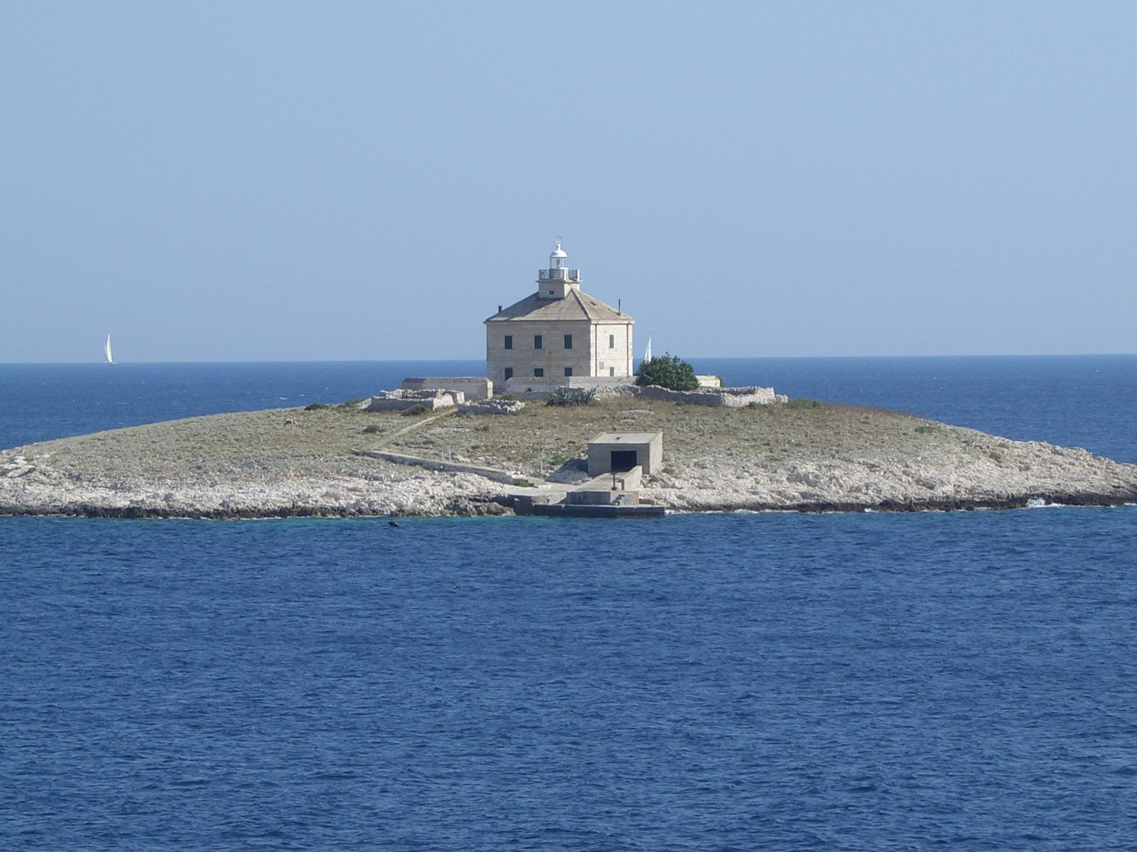 Croatia_0234